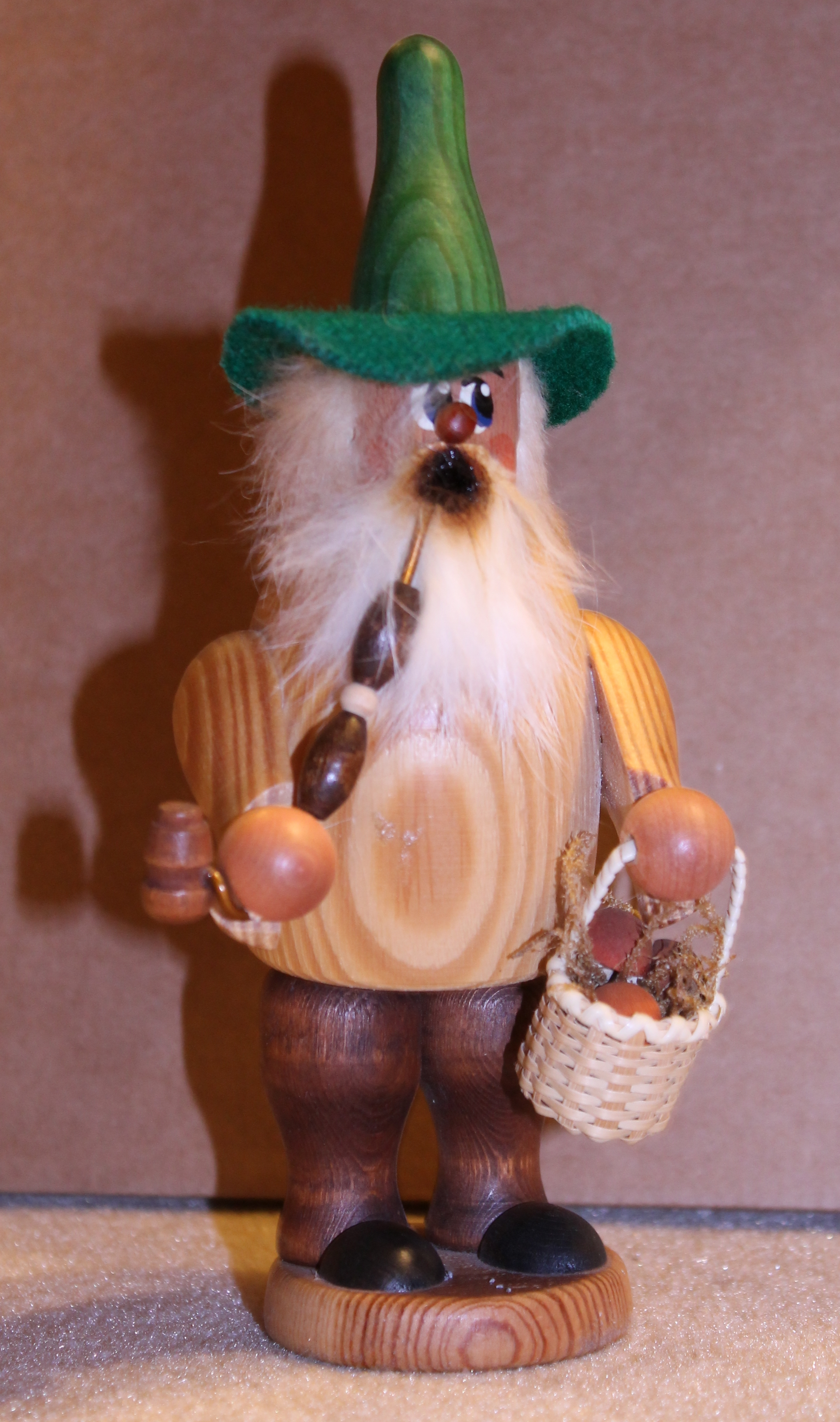 Ein Räuchermännchen aus dem Erzgebirge in Gestalt eines vogtländischen Moosmännels.